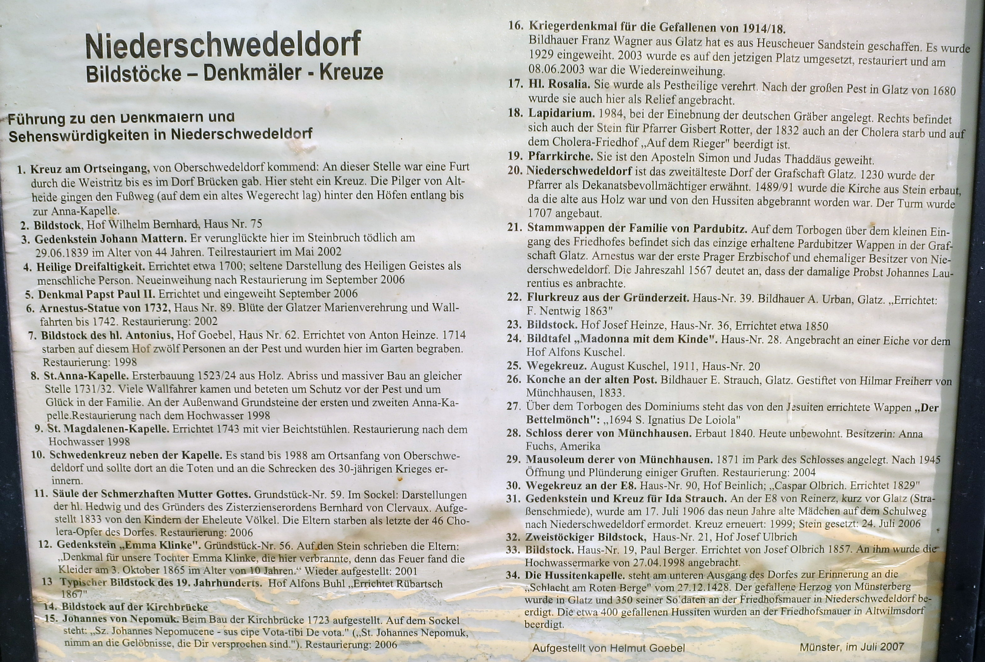 Teil der Tour der Denkmäler Niederschwedeldorf